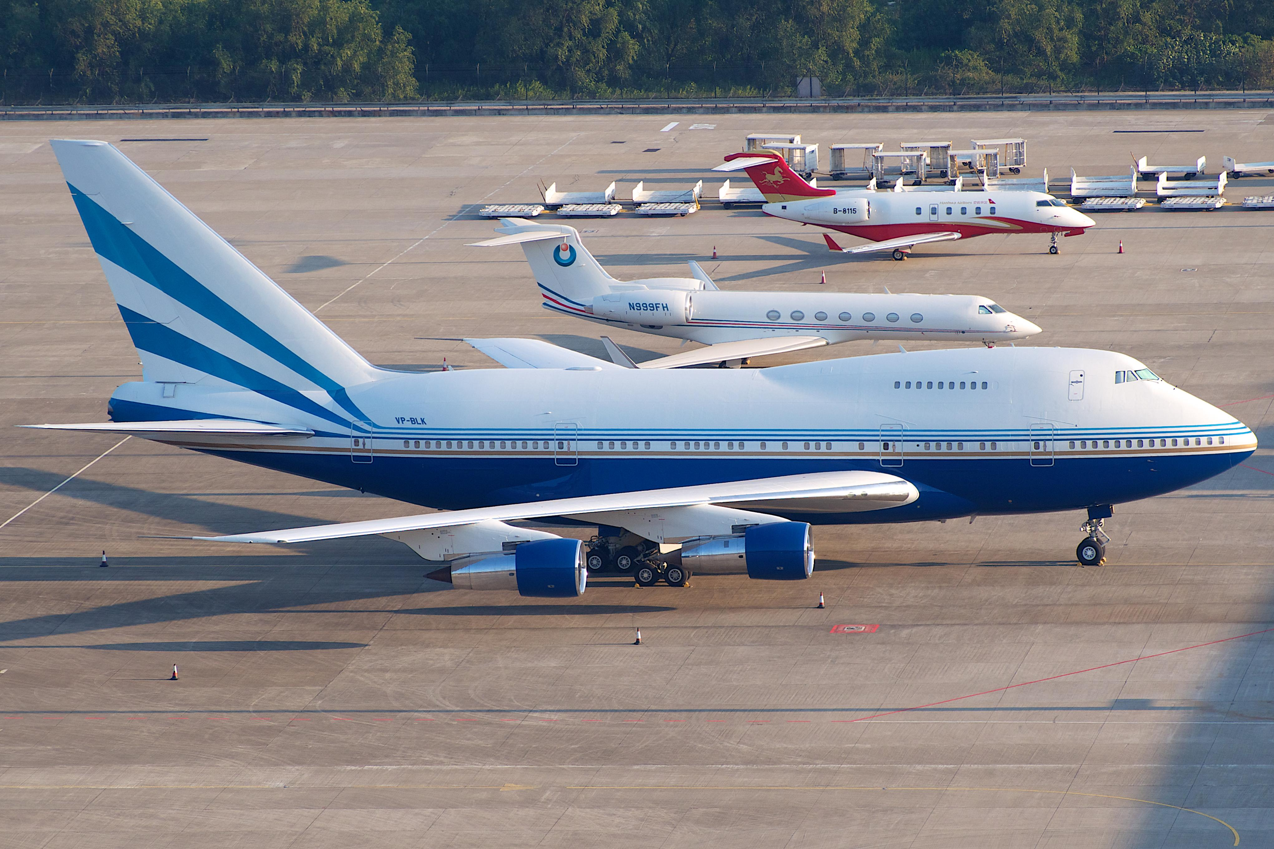 VP-BLK | 747SP-31 | Sands | MFM